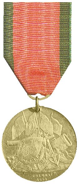 Gouden Medaille voor de generaals in de Krimoorlog